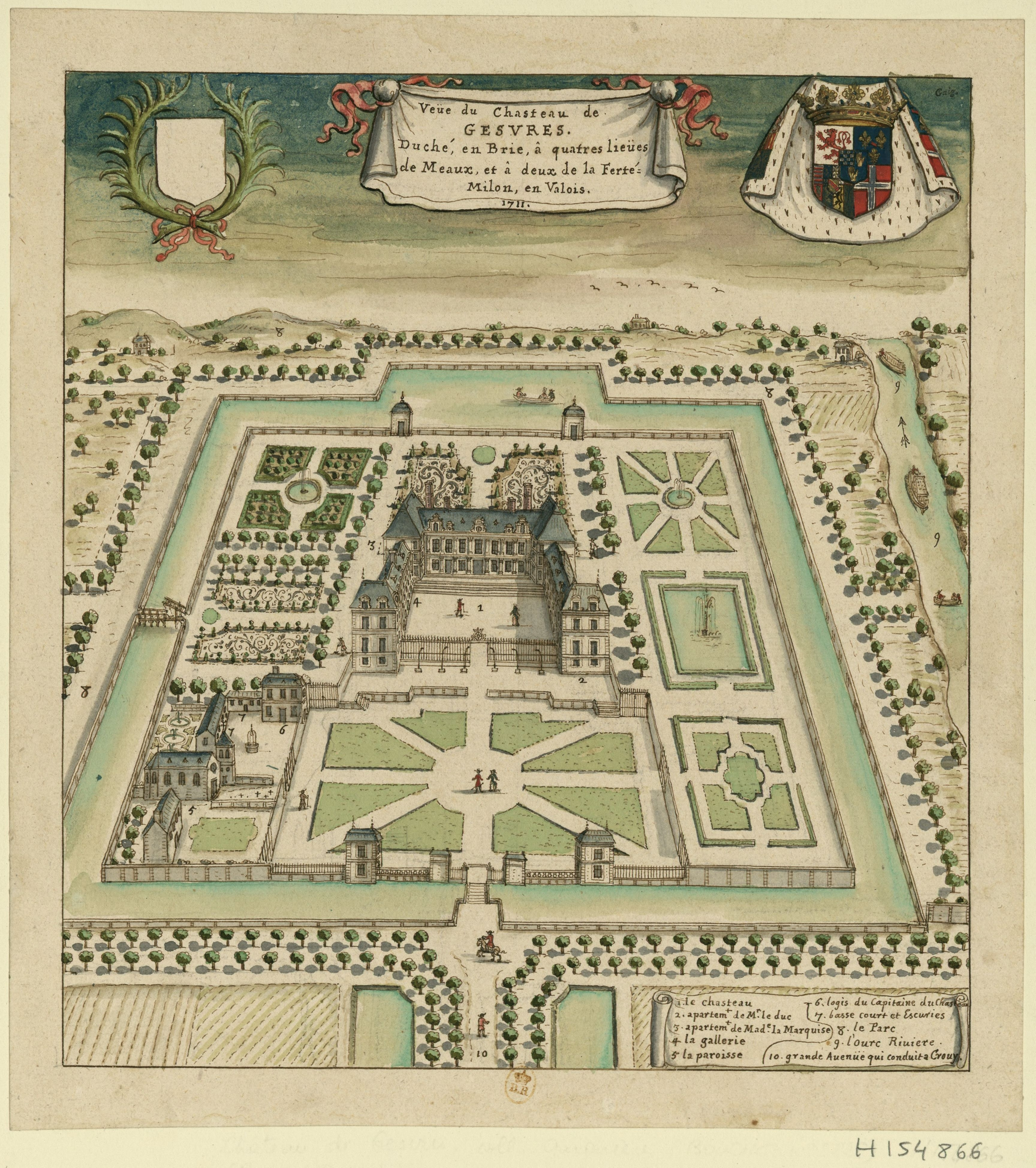 Dessin de Boudan pour Gaignières en 1711. En 1732, la Gergogne, seule, alimente les fossés.